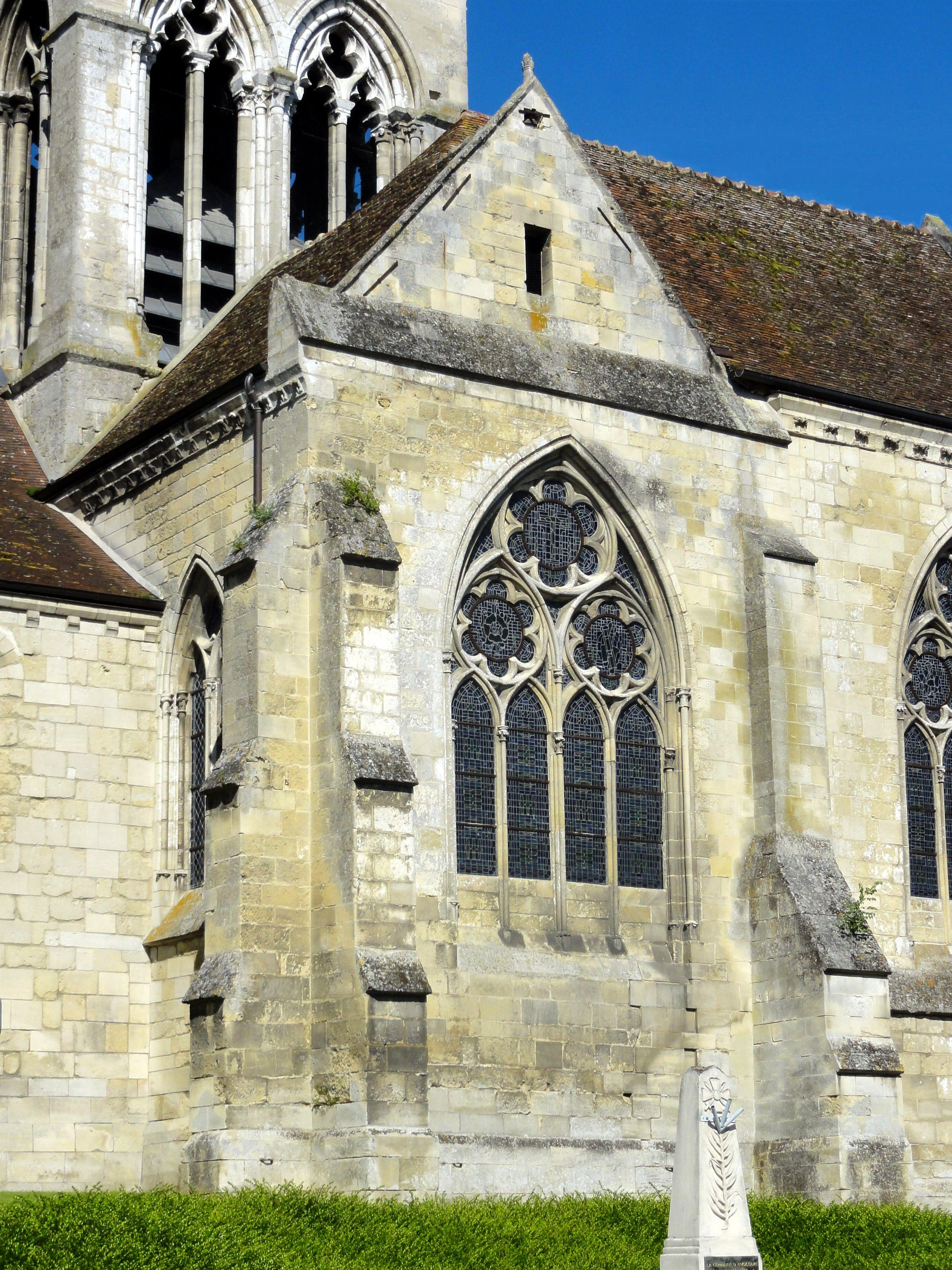 Chœur, chevet du vaisseau central.